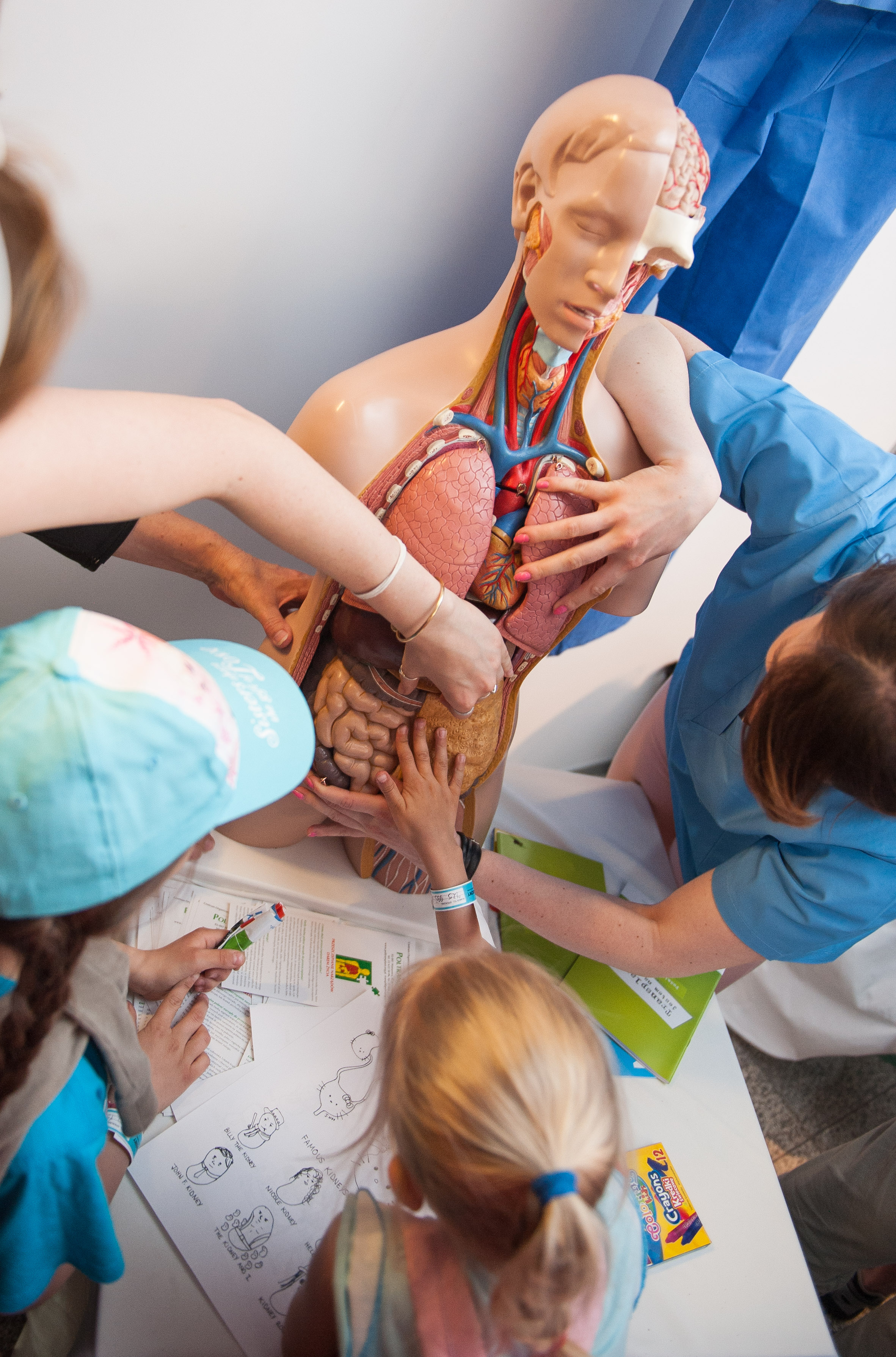 07.05.2016 WARSZAWA STADION NARODOWY PGE - PIKNIK NAUKOWY N/Z STOISKO F10 Studenckie Koło Naukowe "Kindley" przy Klinice Chirurgii Ogólnej i Transplantacyjnej Warszawskiego Uniwersytetu Medycznego